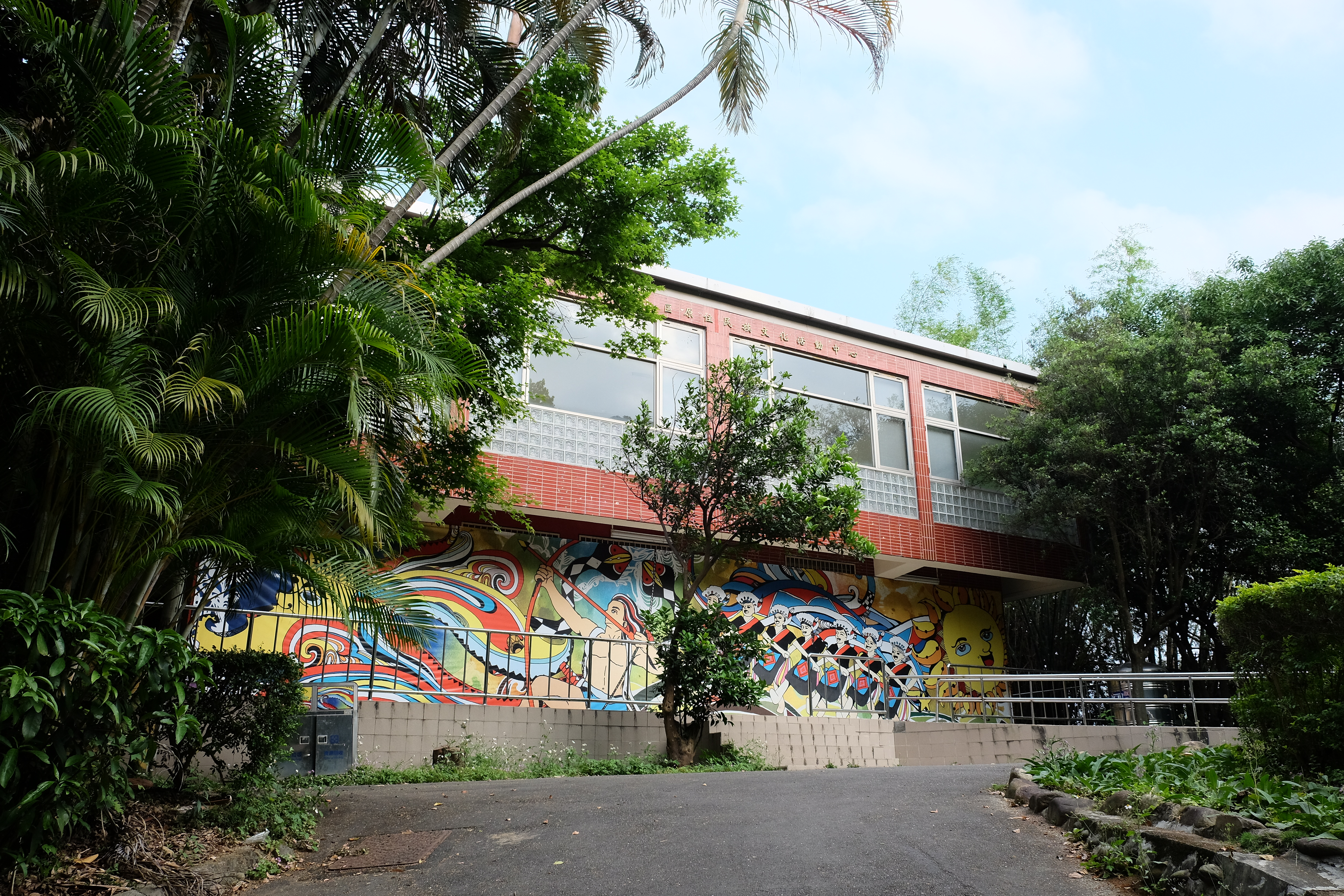 Taishan District Aboriginal Cutural Centre in CiXiu park 2018 泰山區原住民文化活動中心